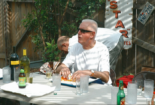 P.G. Moreno P.G. Moreno